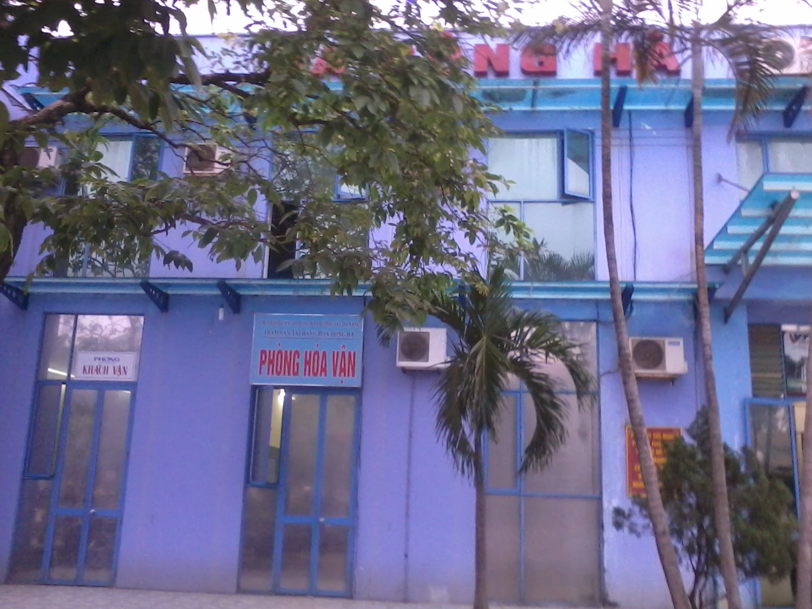 Ga Đông Hà - hình tự chụp bằng điện thoại cá nhân rồi up lên wiki tiếng Việt